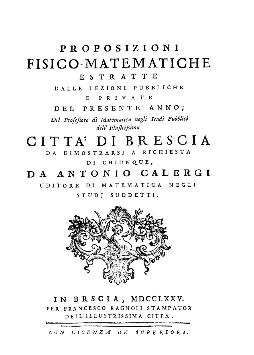 Proposizioni fisico-matematiche estratte dalle lezioni pubbliche e private del presente anno del professore di matematica negli studi pubblici dell'illustrissima città di Brescia da dimostrarsi a richiesta di chiunque da Antonio Calergi ... . - In Brescia : per Francesco Ragnoli, 1775. - [1], 24 p., [1], 1 c. di tav. : ill. ; 4º .